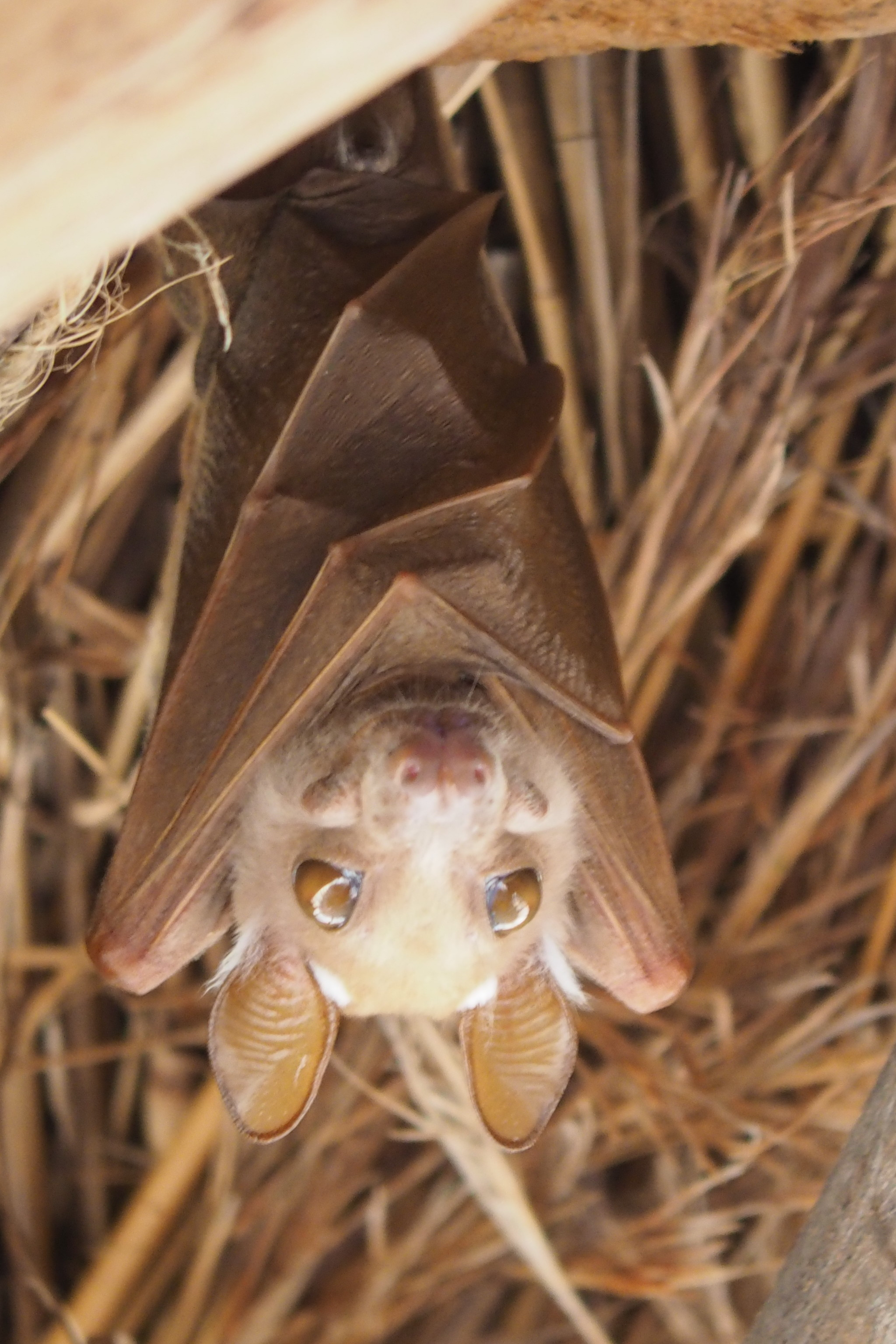 Wahlberg-Epaulettenflughund (Epomophorus wahlbergi)